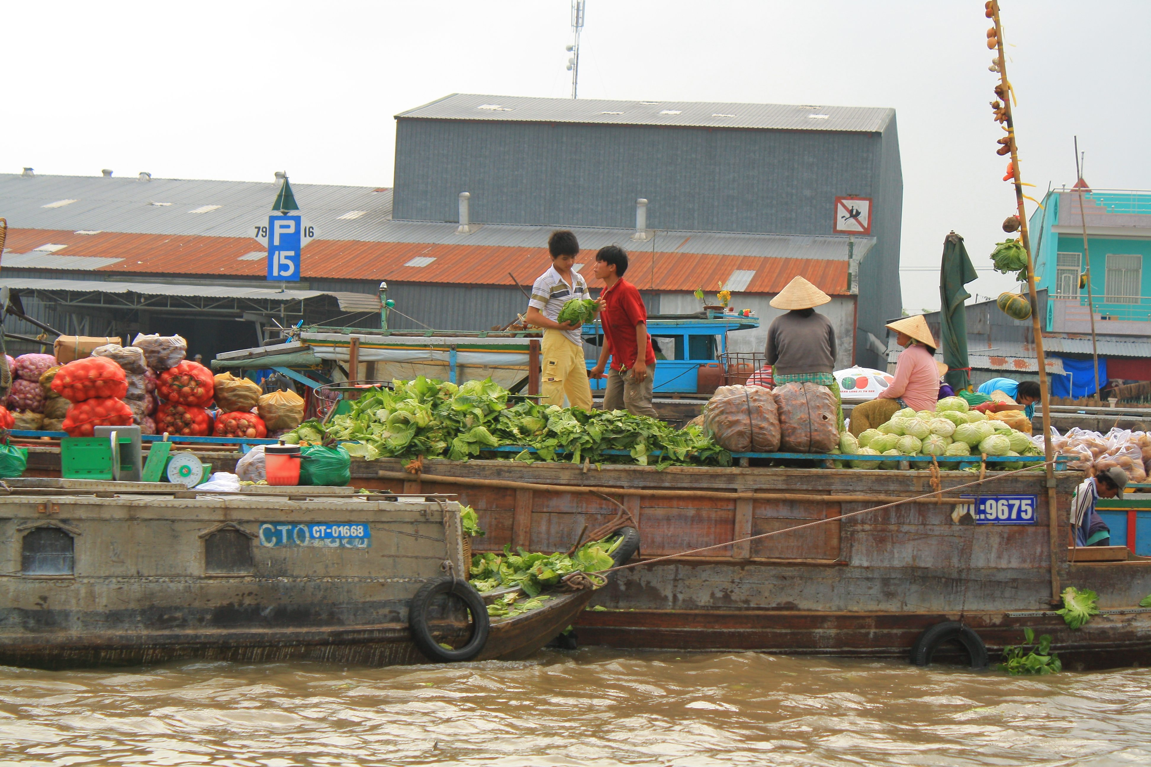 Cai Rang Floating Market